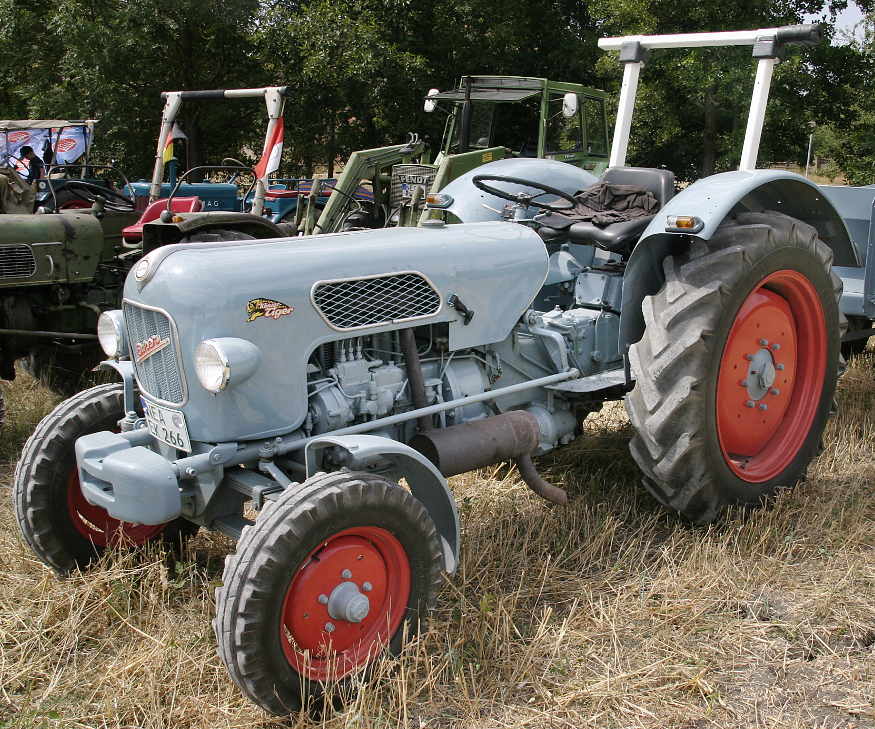 Schleppertreffen 2015 im Freilandmuseum Bad Windsheim Gesamtmasse: 2450 kg Achslast hinten: 1450 kg Achslast vorne: 1000 kg